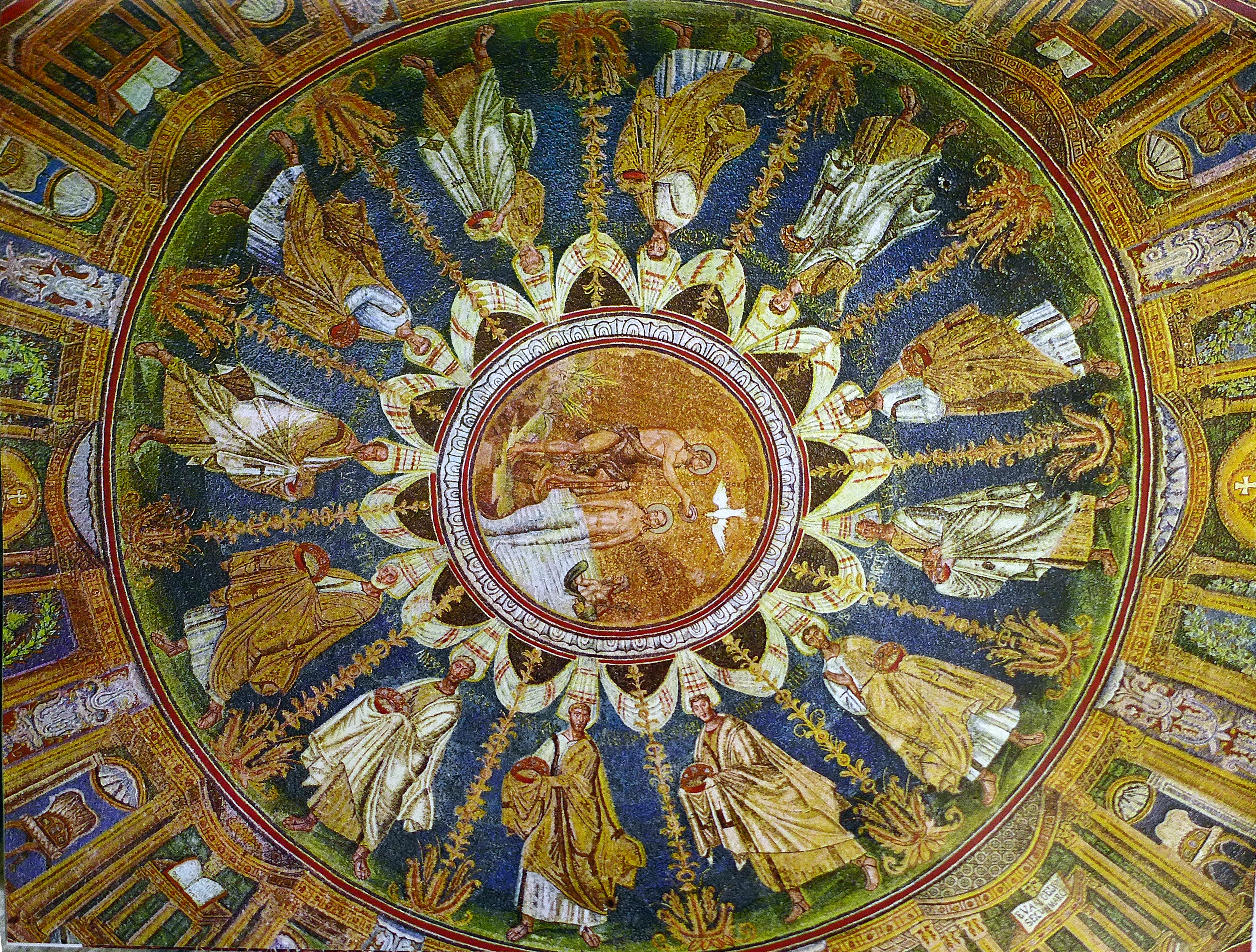 Ravenna: Ortodox keresztelőkápolna (Battistero Neoniano)